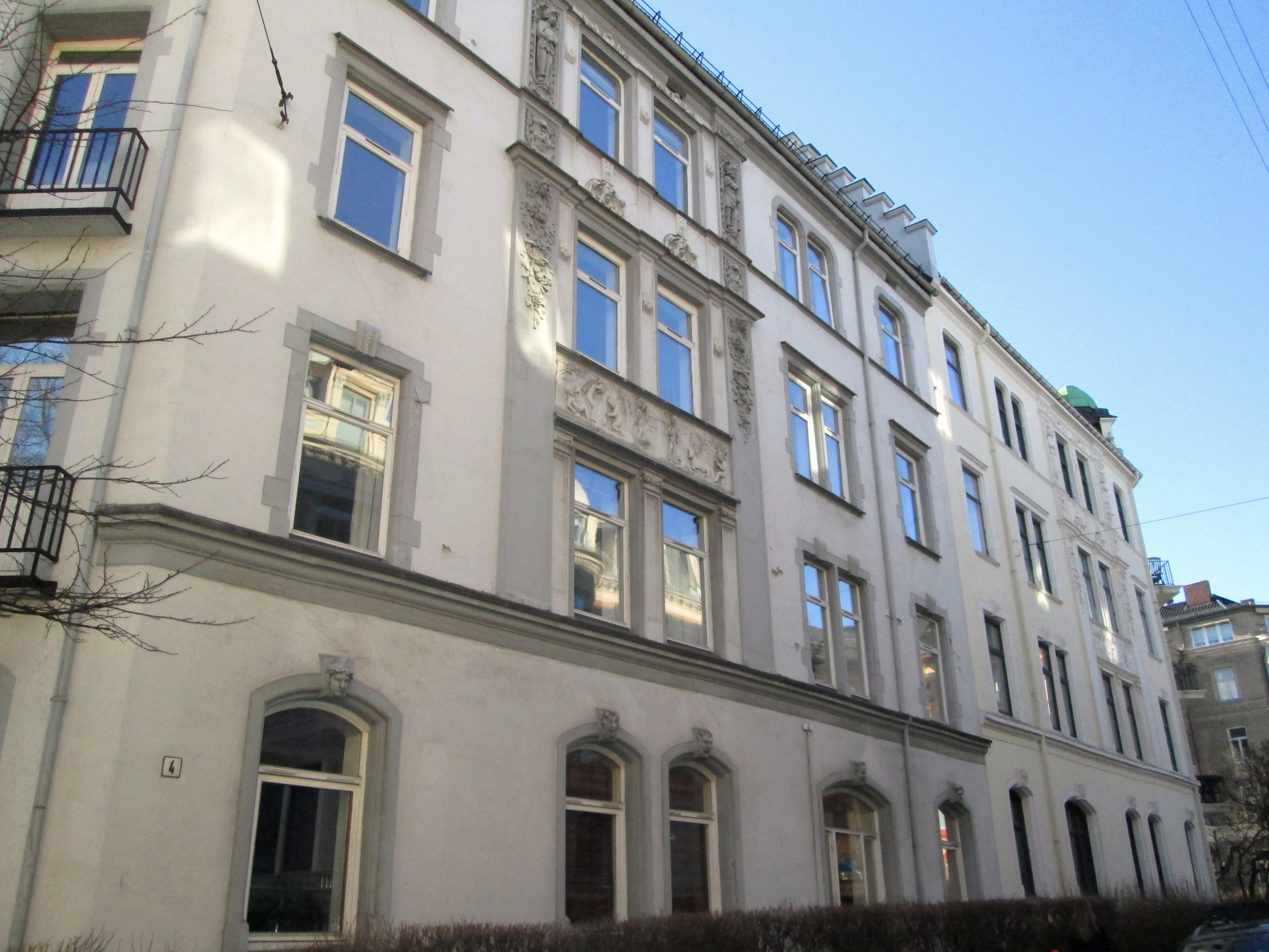 Meltzers gate 4, Frogner, Oslo. bygård fra ca. 1900, arkitekt Eduard Carlén (1866-1959). SSBs første direktør Anders Nicolai Kiær (1838-1919) bodde her i en årrekke. Under krigen hadde Innenriksdepartementet lokaler her.